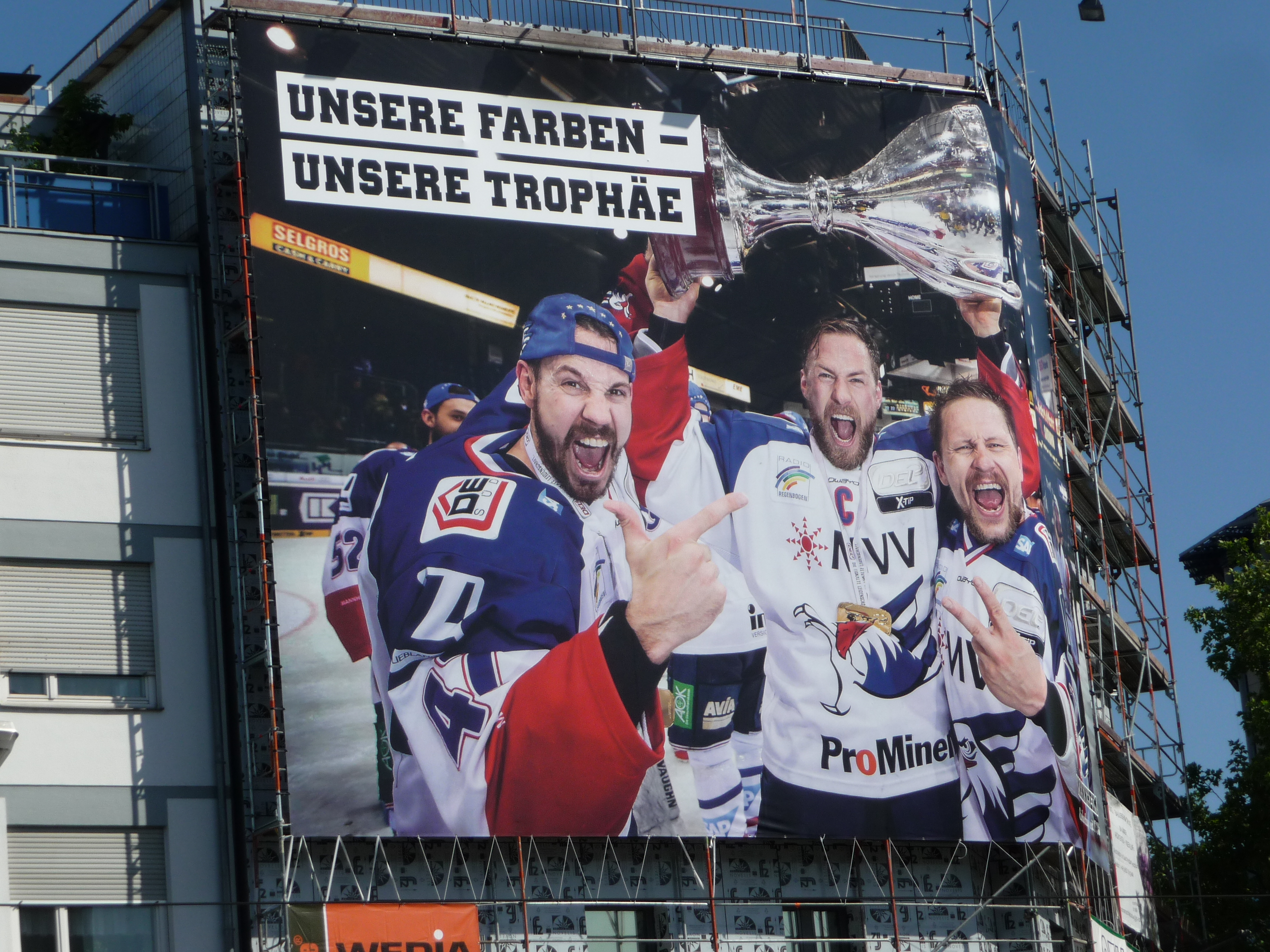 Die Adler Mannheim sind eine deutsche Eishockeymannschaft aus Mannheim, die seit 1994 und damit als Gründungsmitglied in der Deutschen Eishockey Liga spielt. Die Profimannschaft wurde 1994 als GmbH vom 1938 gegründeten Mannheimer ERC ausgelagert, der Stammverein ist noch heute für den Amateur-, Frauen- und Nachwuchsbereich verantwortlich. Eigentümer der Spielbetriebsgesellschaft ist Daniel Hopp.